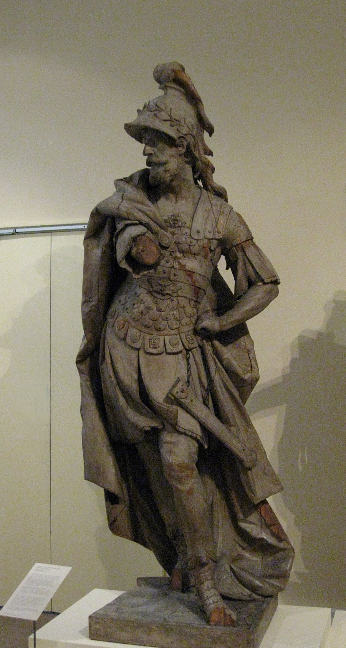 Johann Baptist Straub: Mars, um 1772, Lindenholz, Bayerisches Nationalmuseum in München